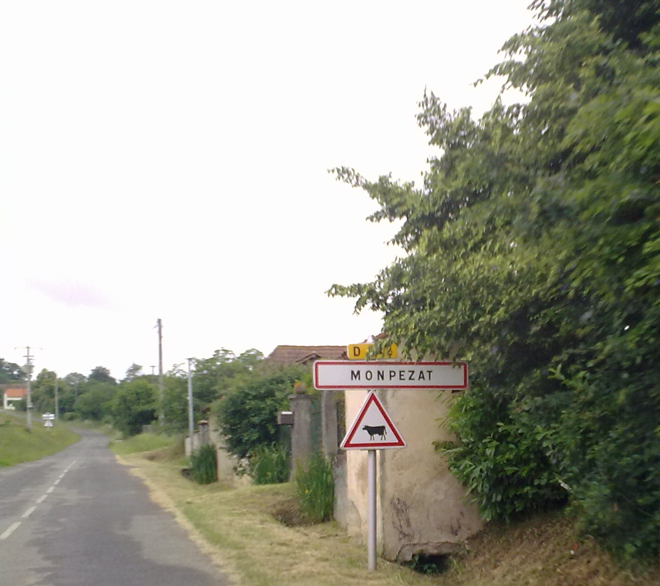 Monpezat